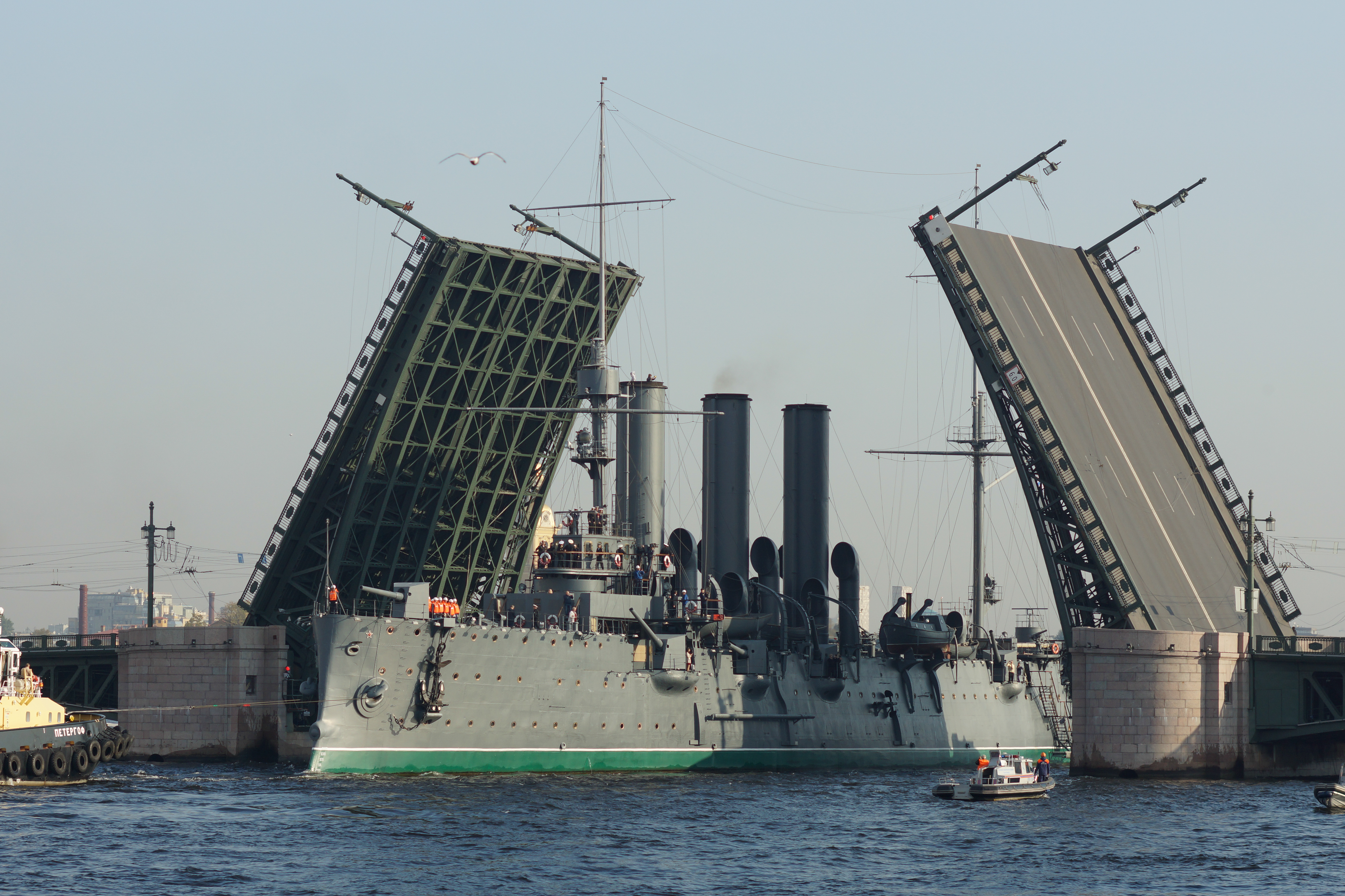 Крейсер Аврора проходит под разведенным Дворцовым мостом